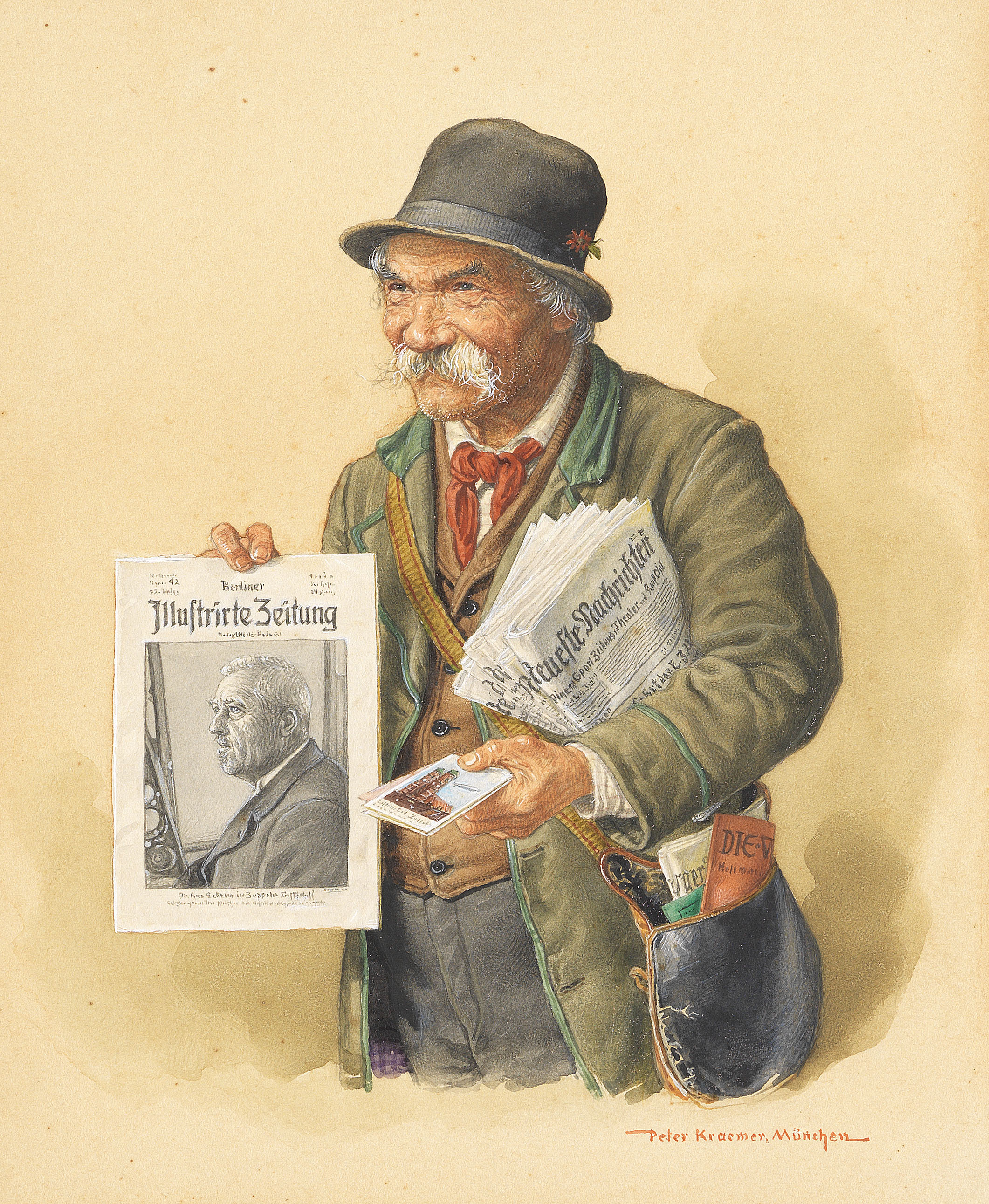 Münchener Zeitungsverkäufer mit der "Berliner Illustrierten Zeitung" mit einer Schlagzeile zu Zeppelin-Luftschiffen, ca. 1910er Jahre. Aquarell